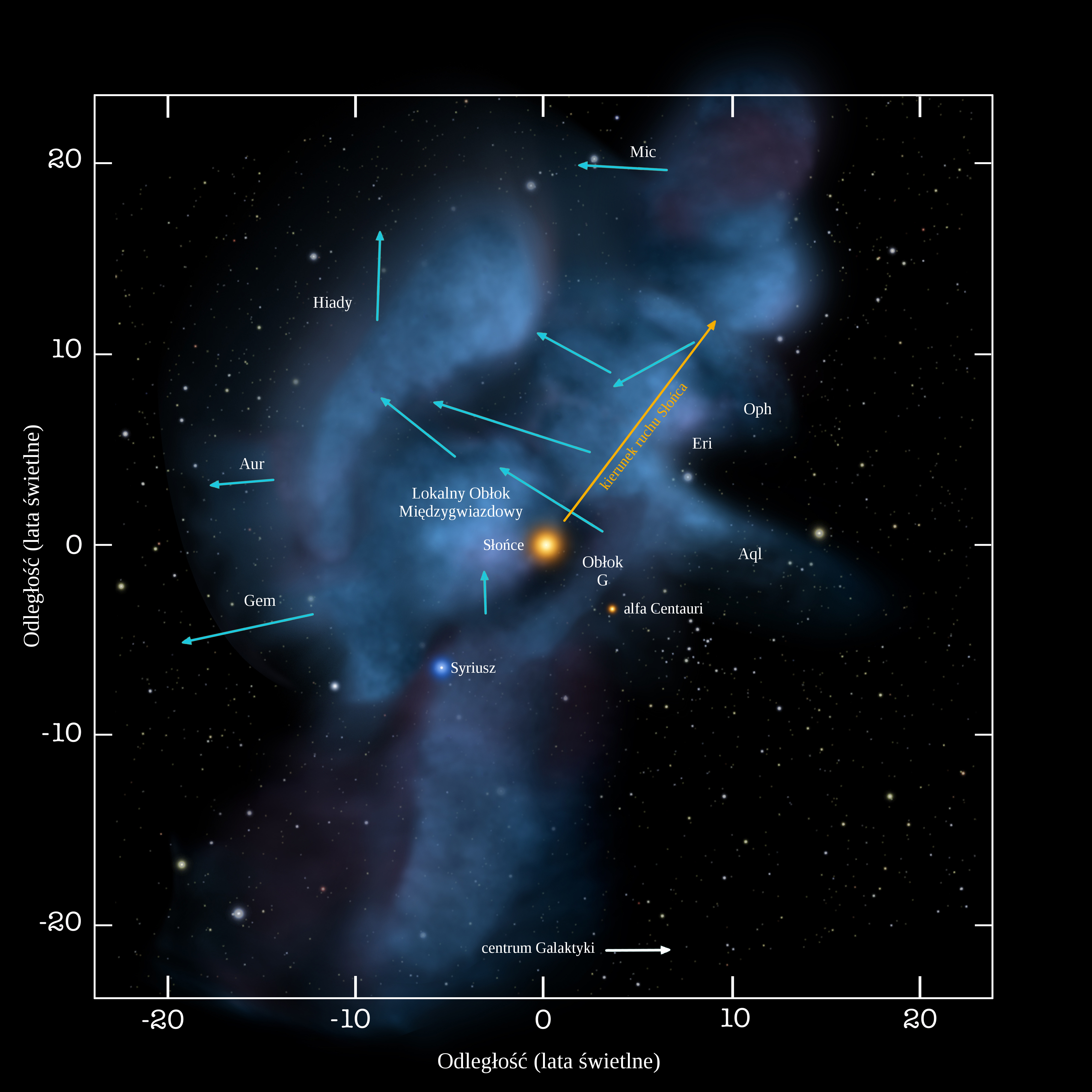 Obłoki bardzo rozrzedzonej materii międzygwiazdowej otaczające Układ Słoneczny; niebieskie strzałki wskazują kierunki ich ruchu.